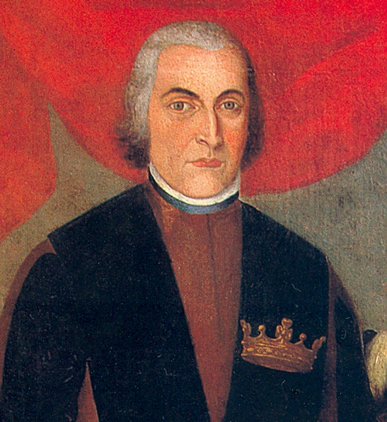 Retrato de Vicente José Morales y Duárez (1757-1812), jurista, catedrático sanmarquino y presidente de las Cortes de Cádiz.